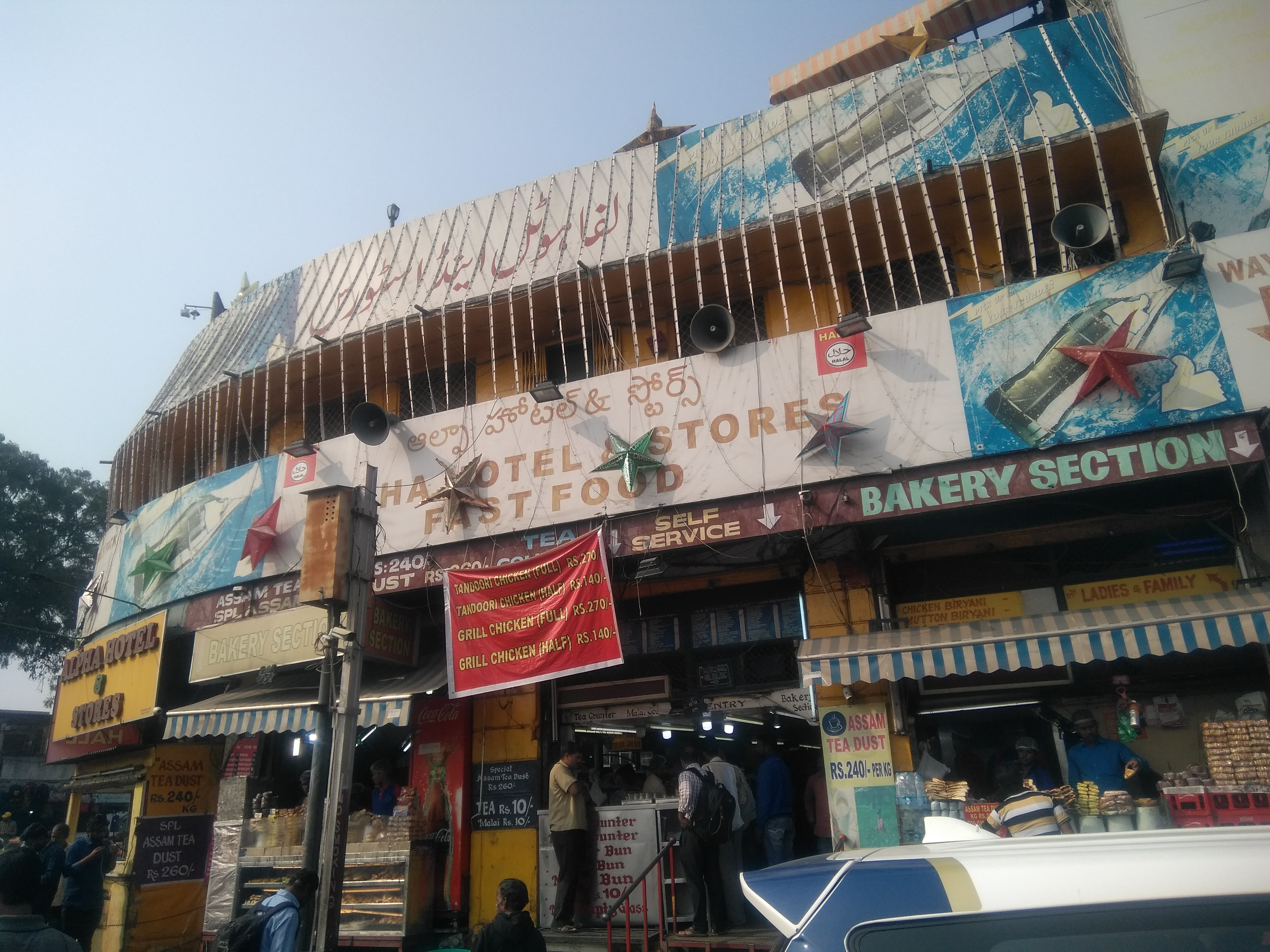 Alpha Hotel, Secunderabad